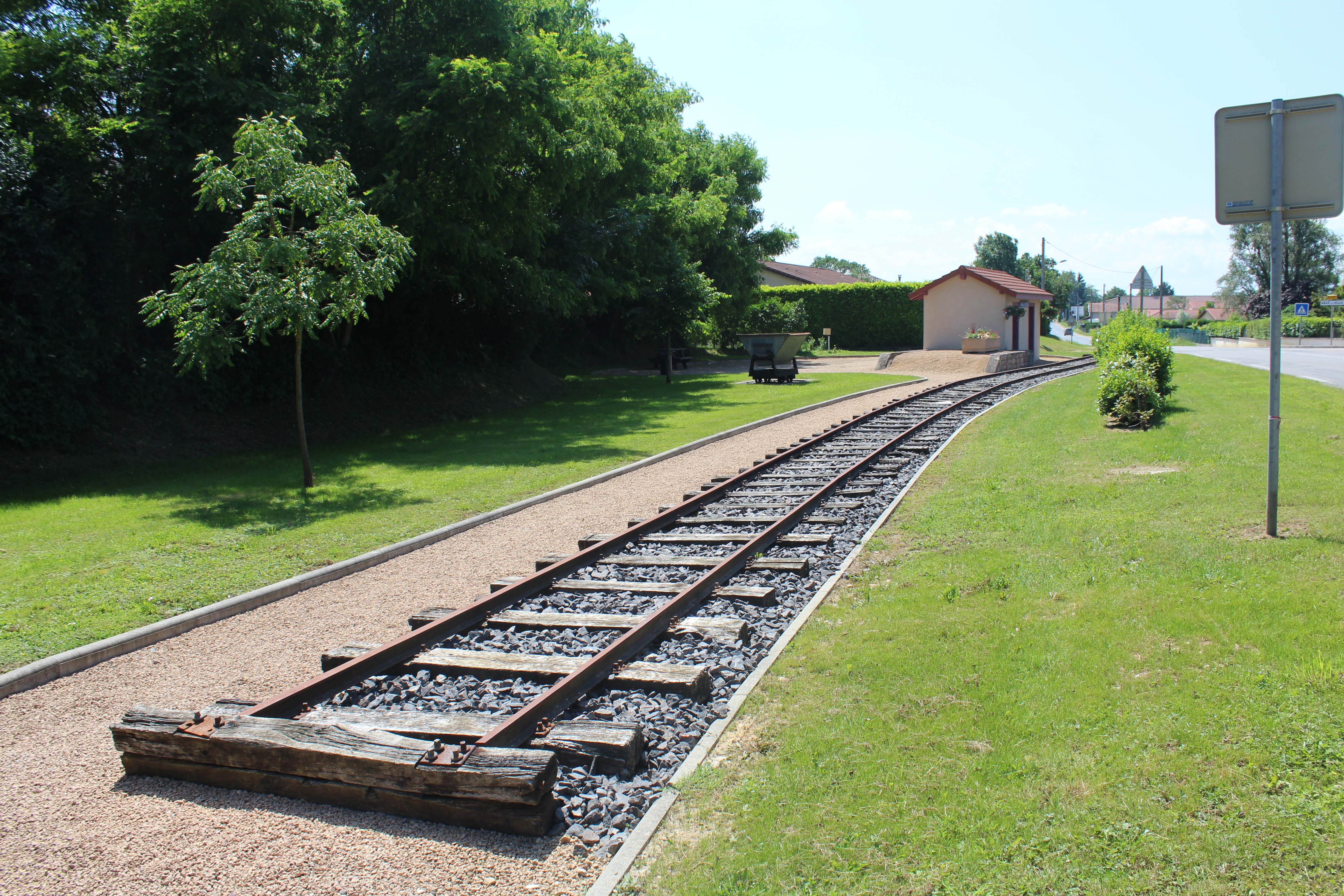 Partie de voie ferrée vers le bâtiment de l'ancienne gare de Bâgé-la-Ville.